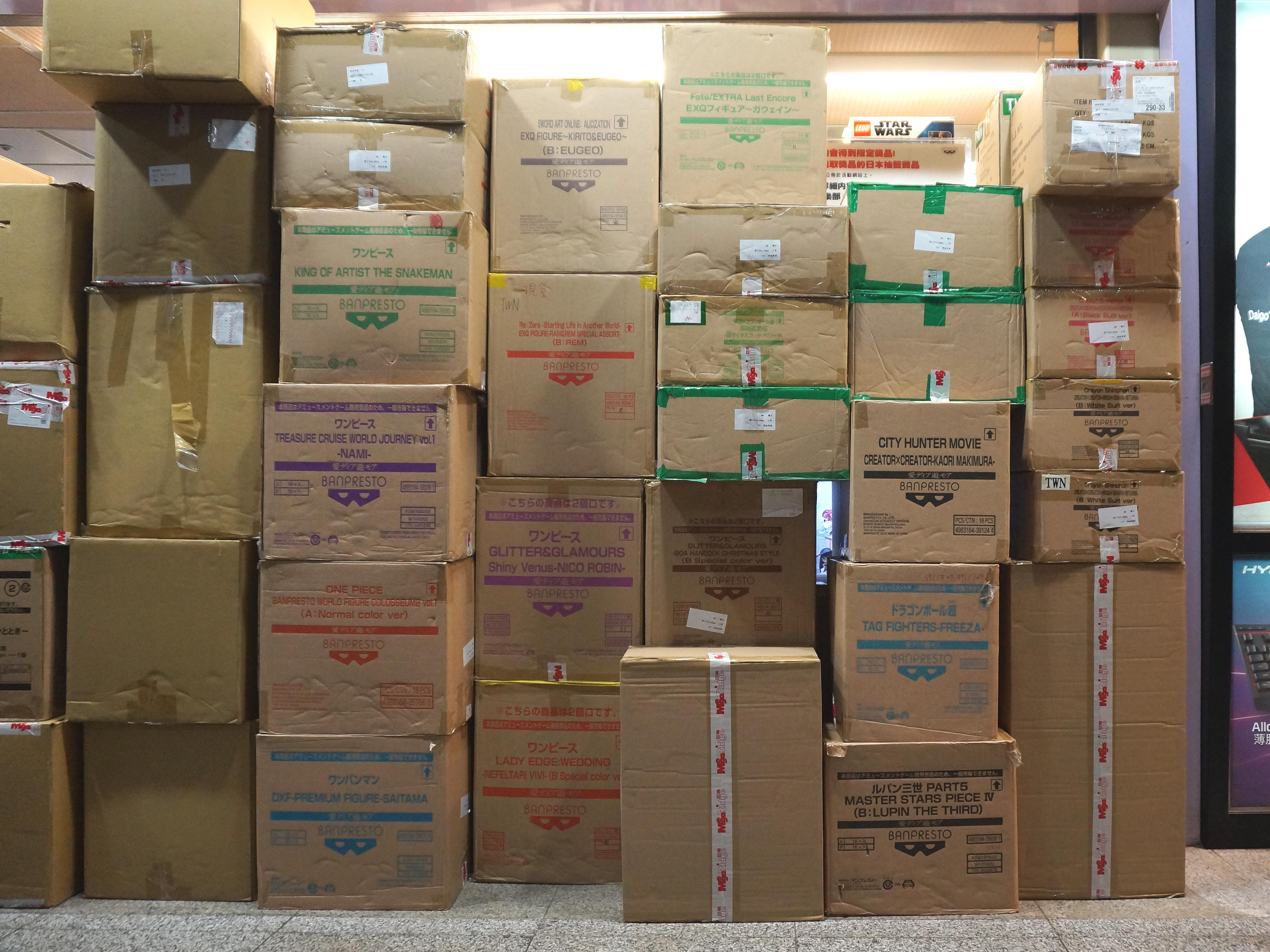 中文（台灣）: 台北地下街堆置的Banpresto商品瓦楞紙箱，箱頂貼巨崗洋行封箱膠帶。